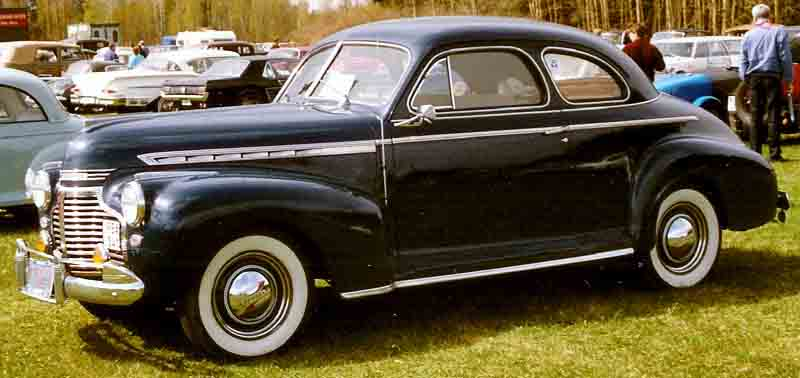 1941 Chevrolet De Luxe Series AH Business Coupe